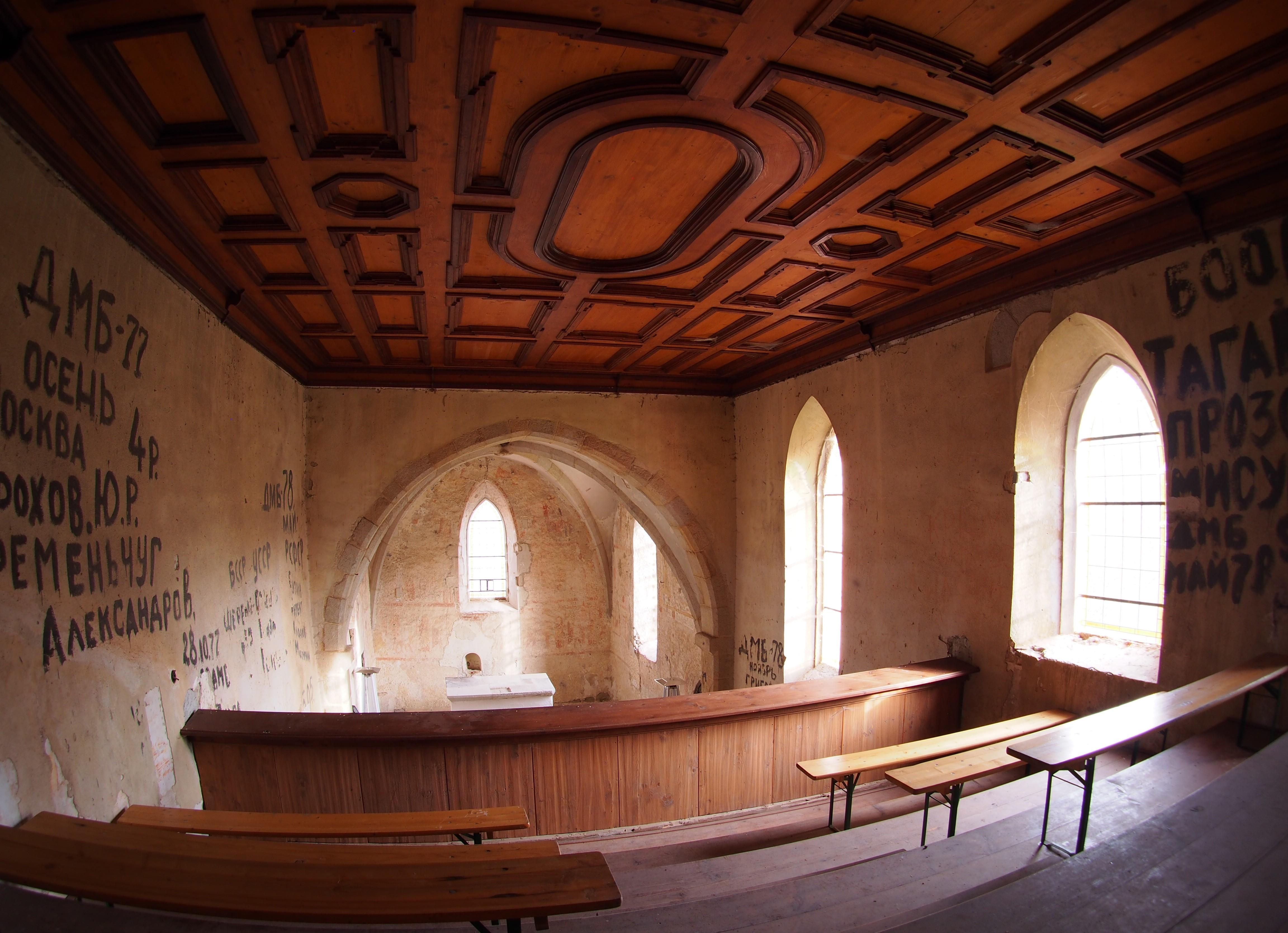 Interiér kostela